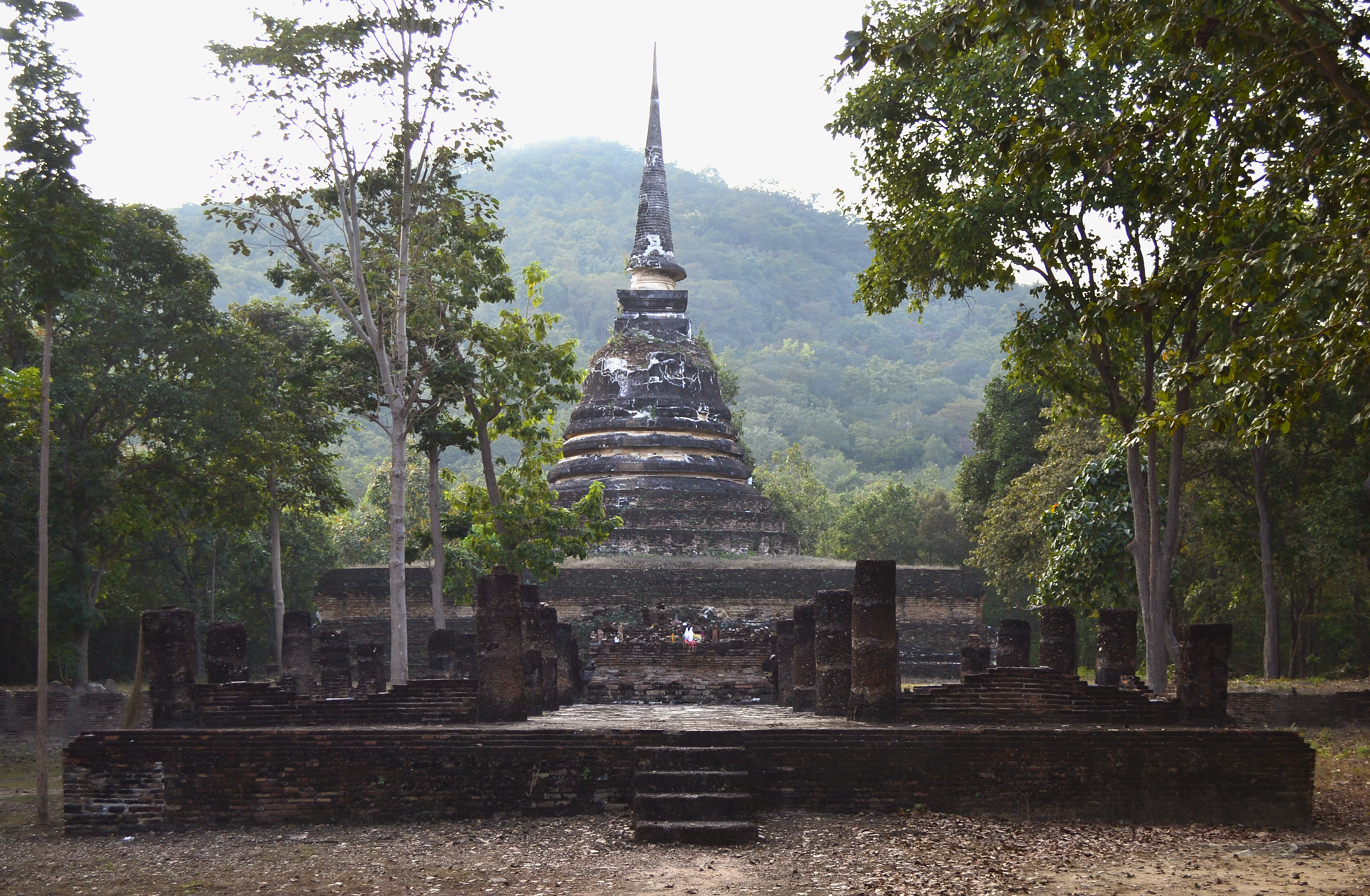 Wat Chedi Ngam im Geschichtspark Sukhothai